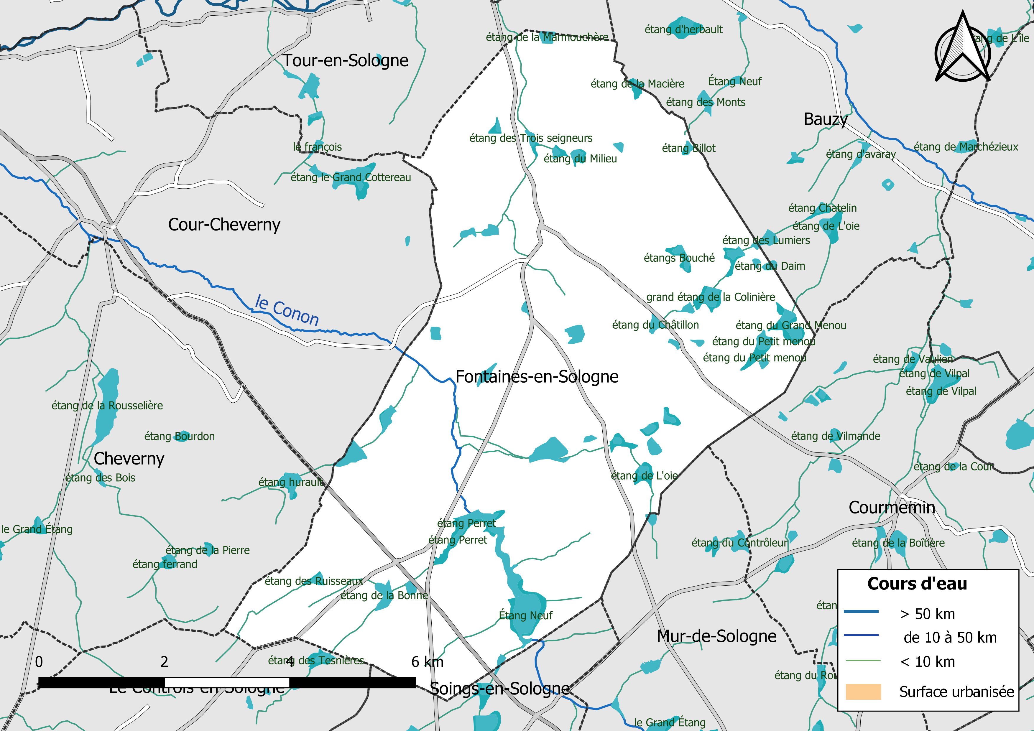 Carte du réseau hydrographique de la commune de Fontaines-en-Sologne (Loir-et-Cher, France).